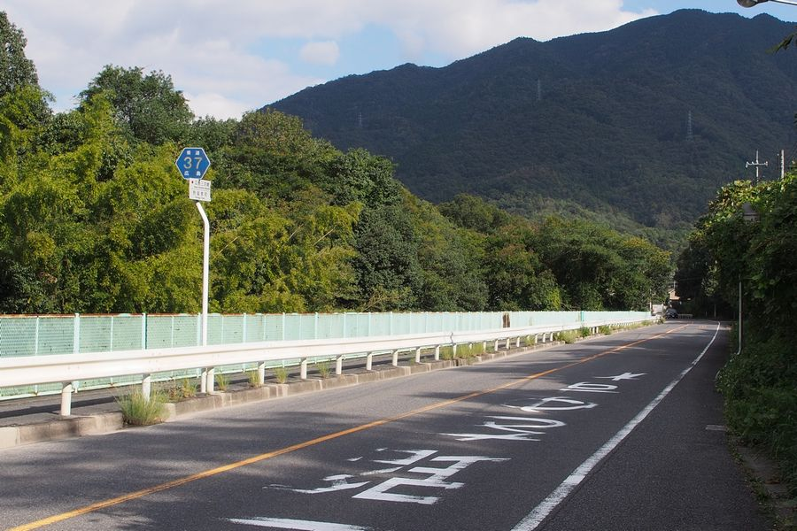 広島県道37号広島三次線（広島県広島市安佐北区狩留家町）